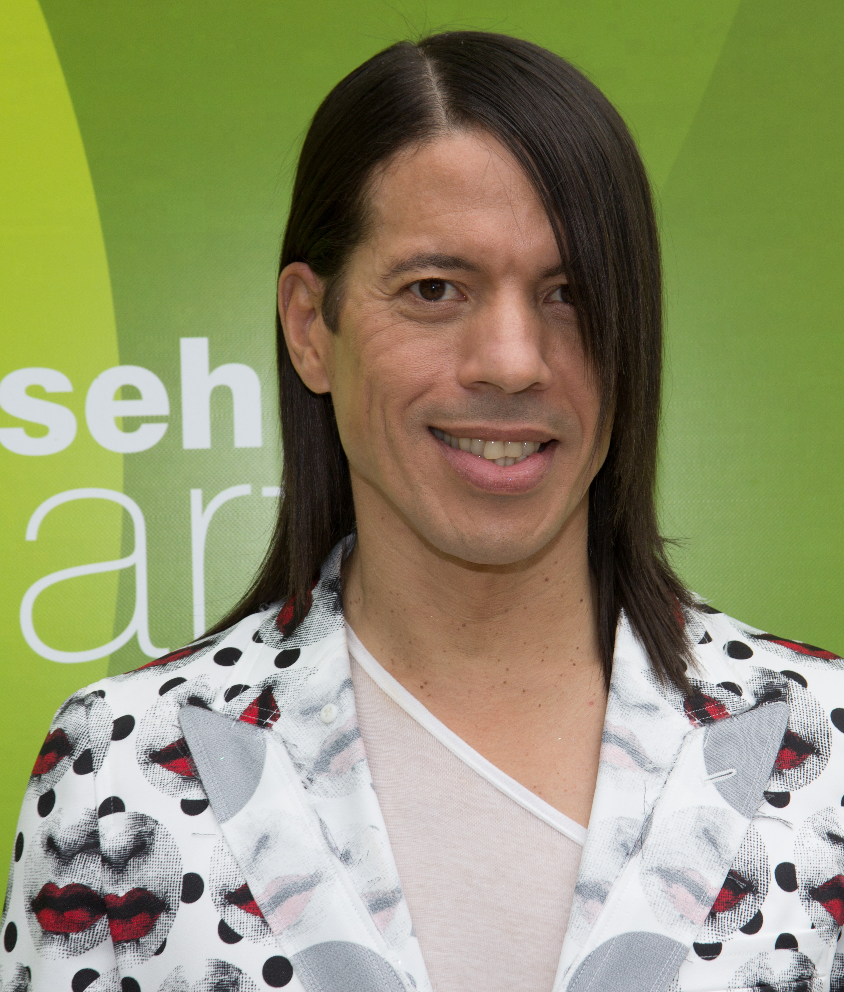 Jorge González als Gast beim ZDF-Fernsehgarten am 20. Mai 2018 in Mainz.